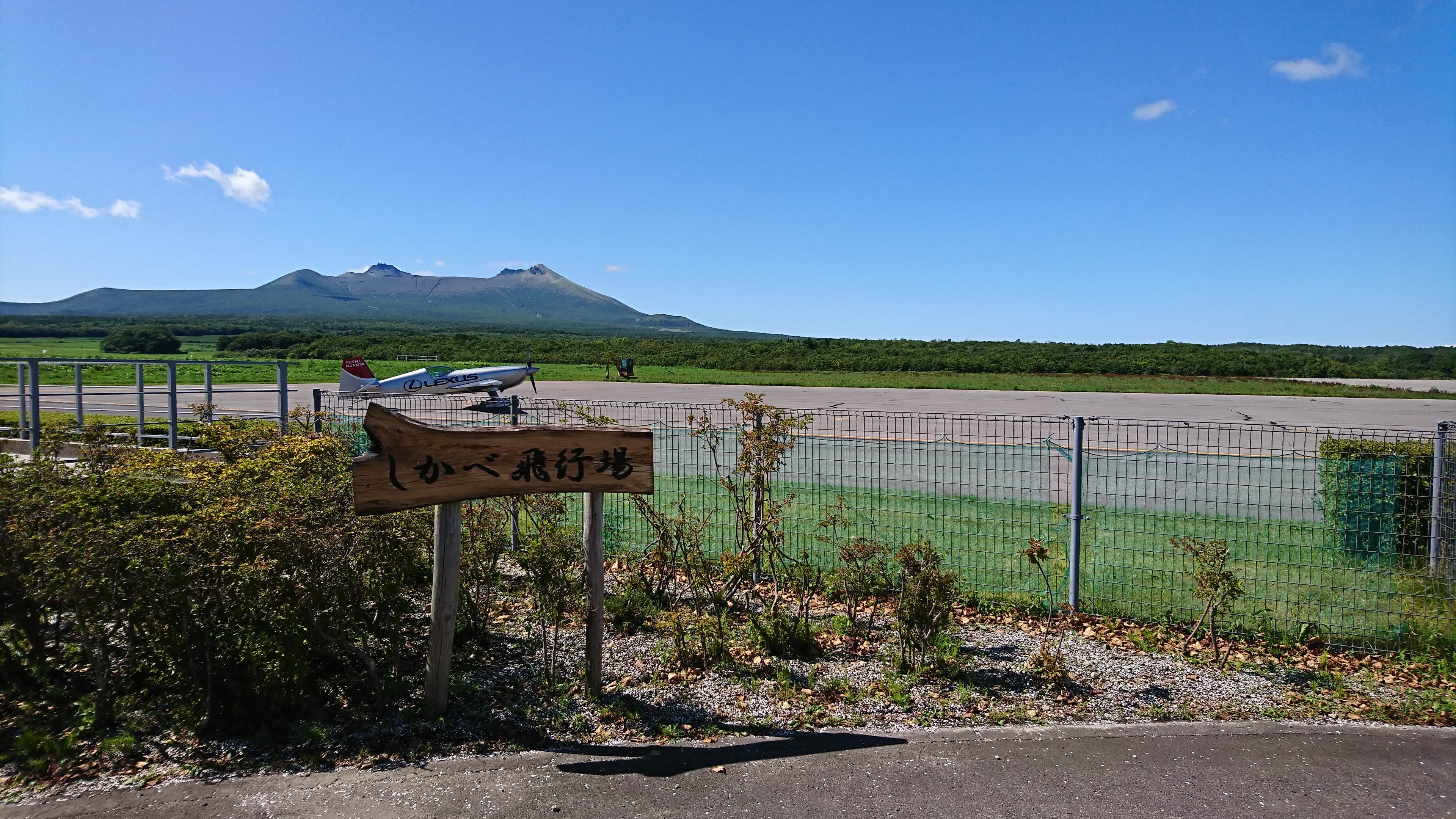 鹿部飛行場